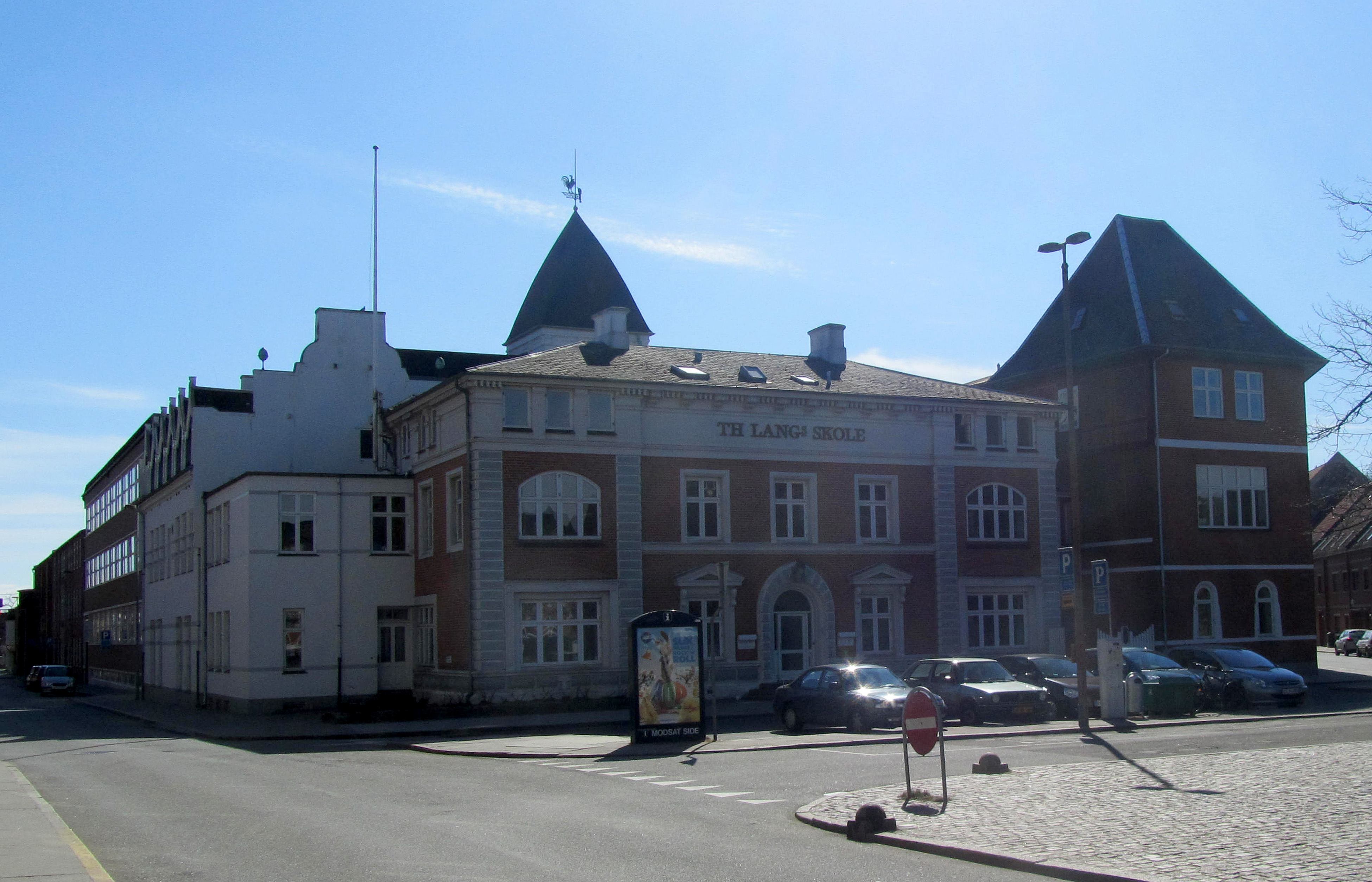 Th. Langs Skoler på Skoletorvet i Silkeborg